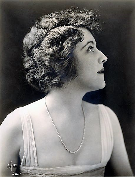 Grace Valentine